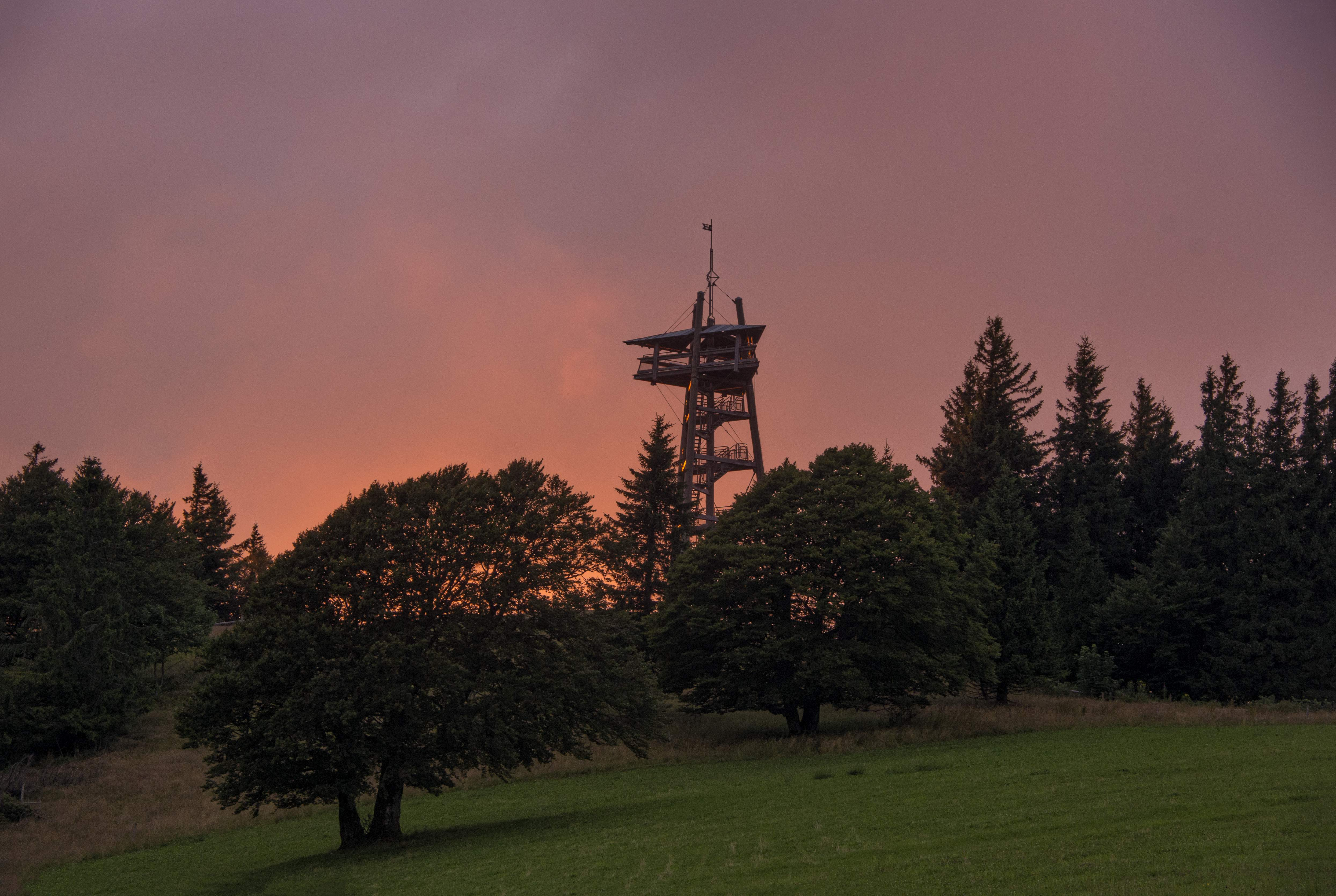 Pfad der Sinne am Schauinsland